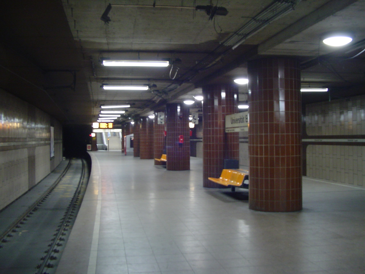 Essen Stadtbahn